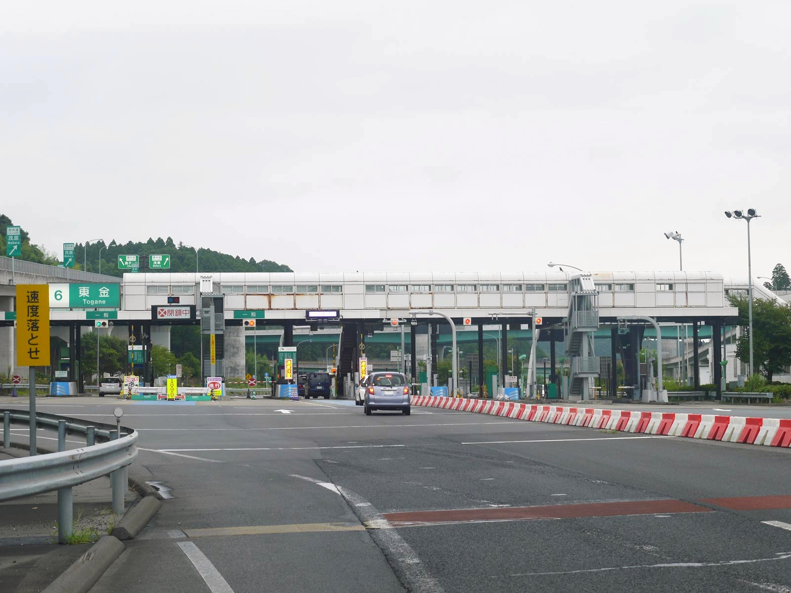 千葉東金道路 東金IC